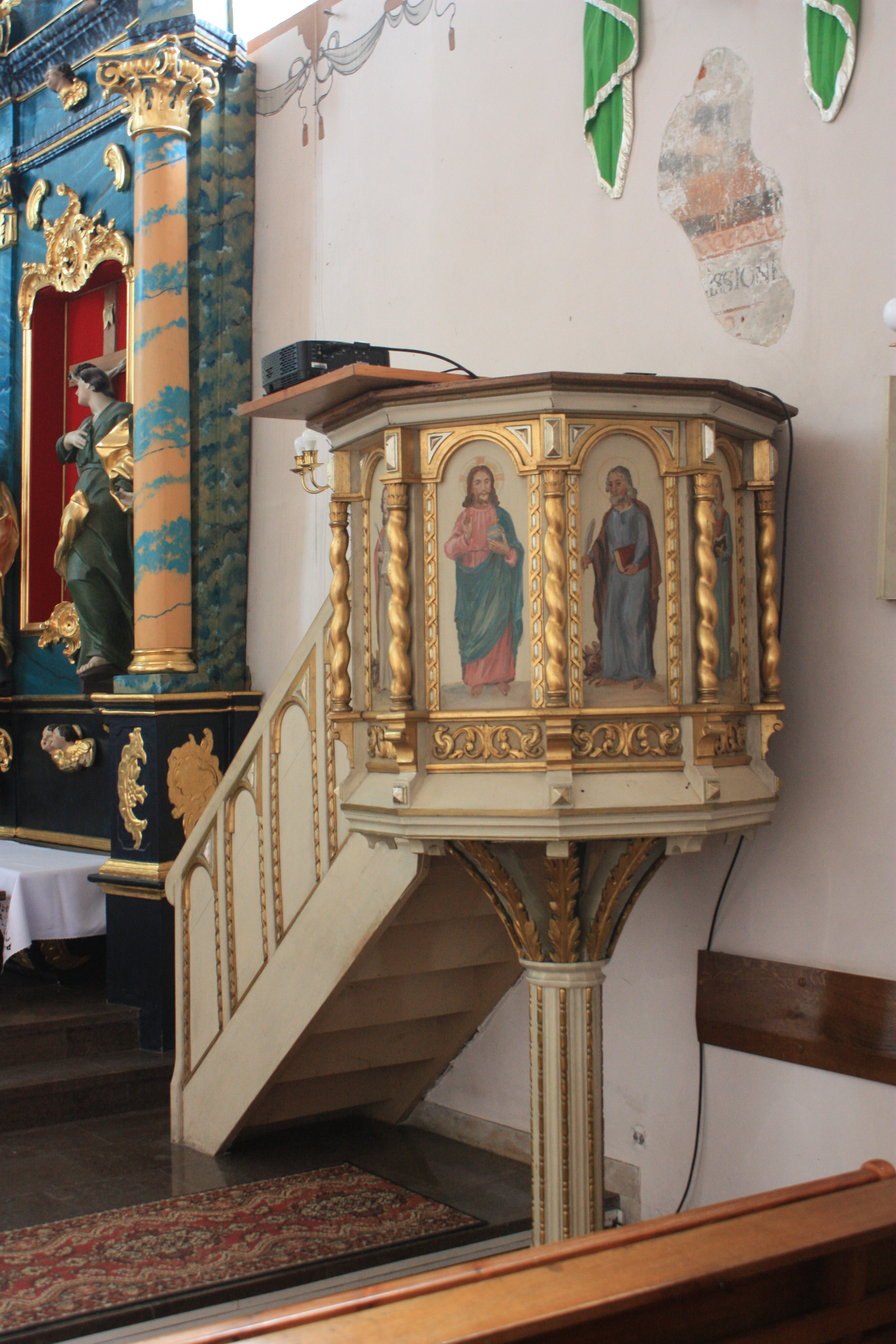 Kościół Narodzenia NMP w Kaźmierzu. Ambona.